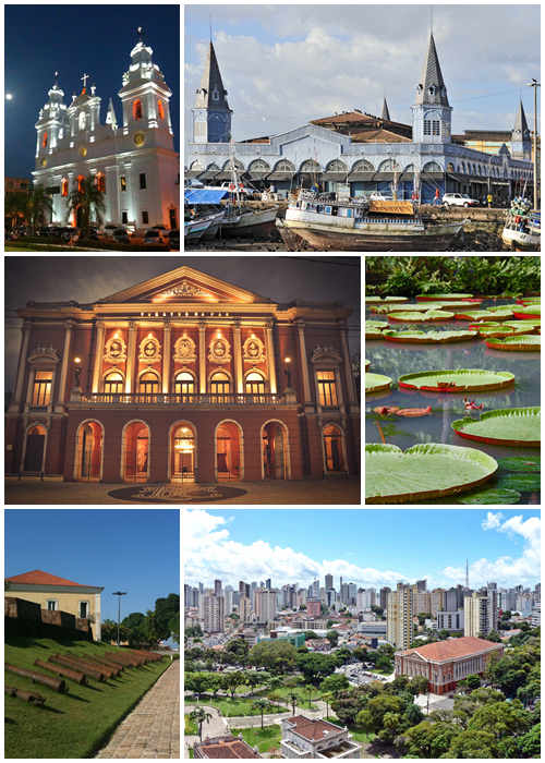 Montagem de fotos da cidade de Belém, Brasil